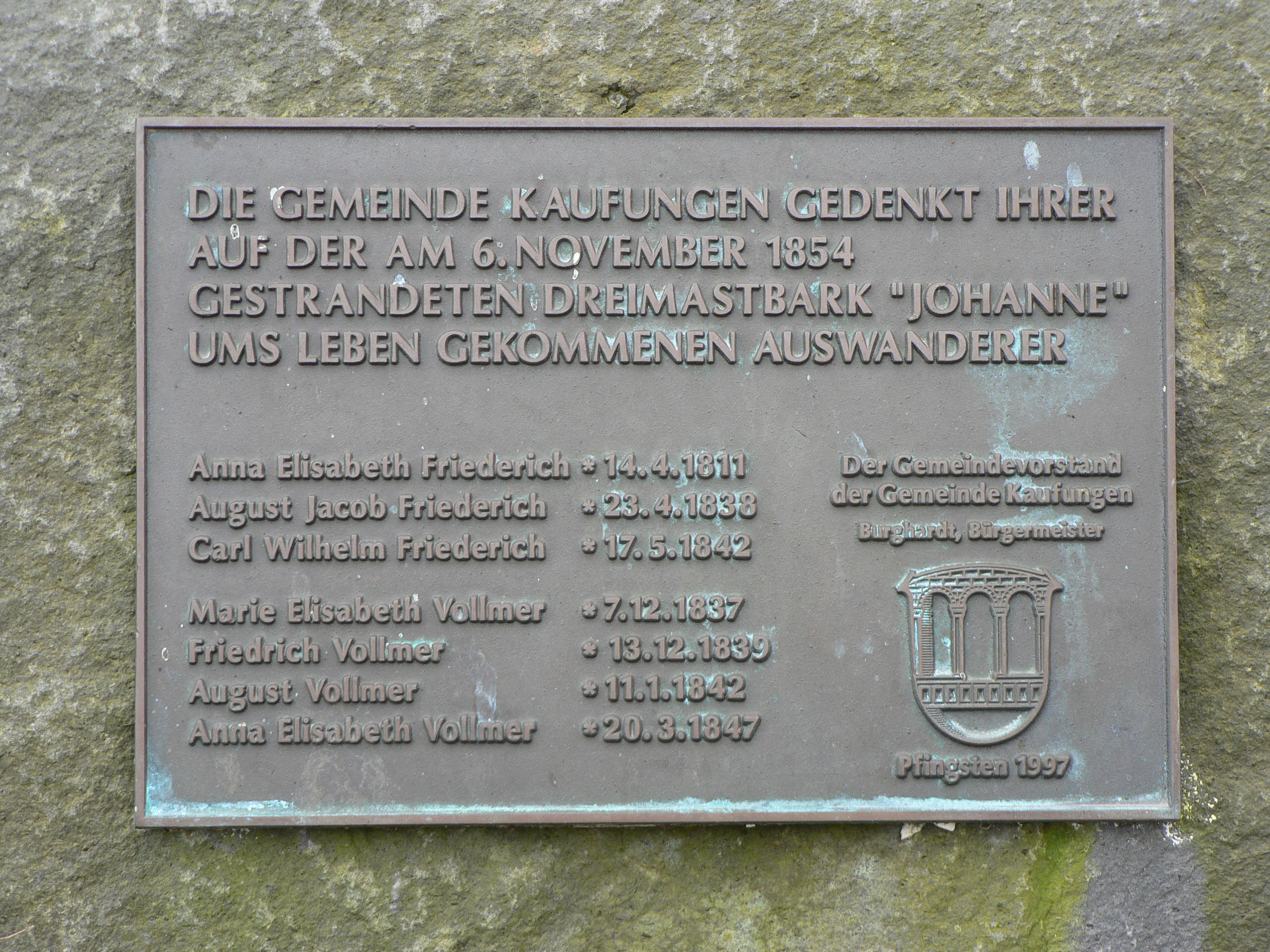 Drinkeldodenkarkhof: Gedenktafel-2: Auswanderer aus Kaufungen